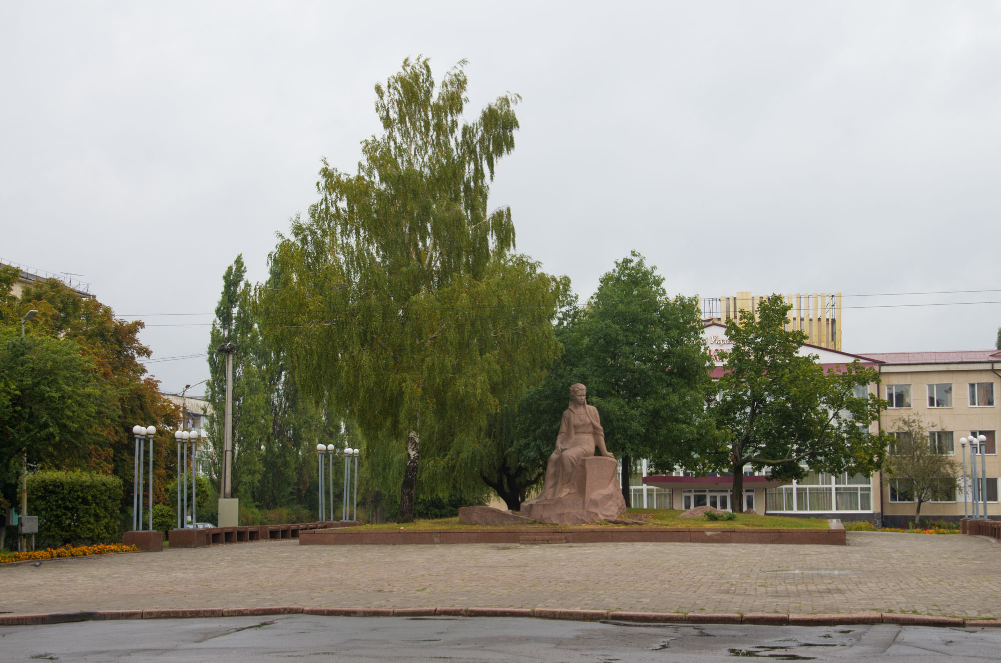 Пам'ятник Лесі Українці, Новоград-Волинський, Вул. Шевченка, біля Будинку культури